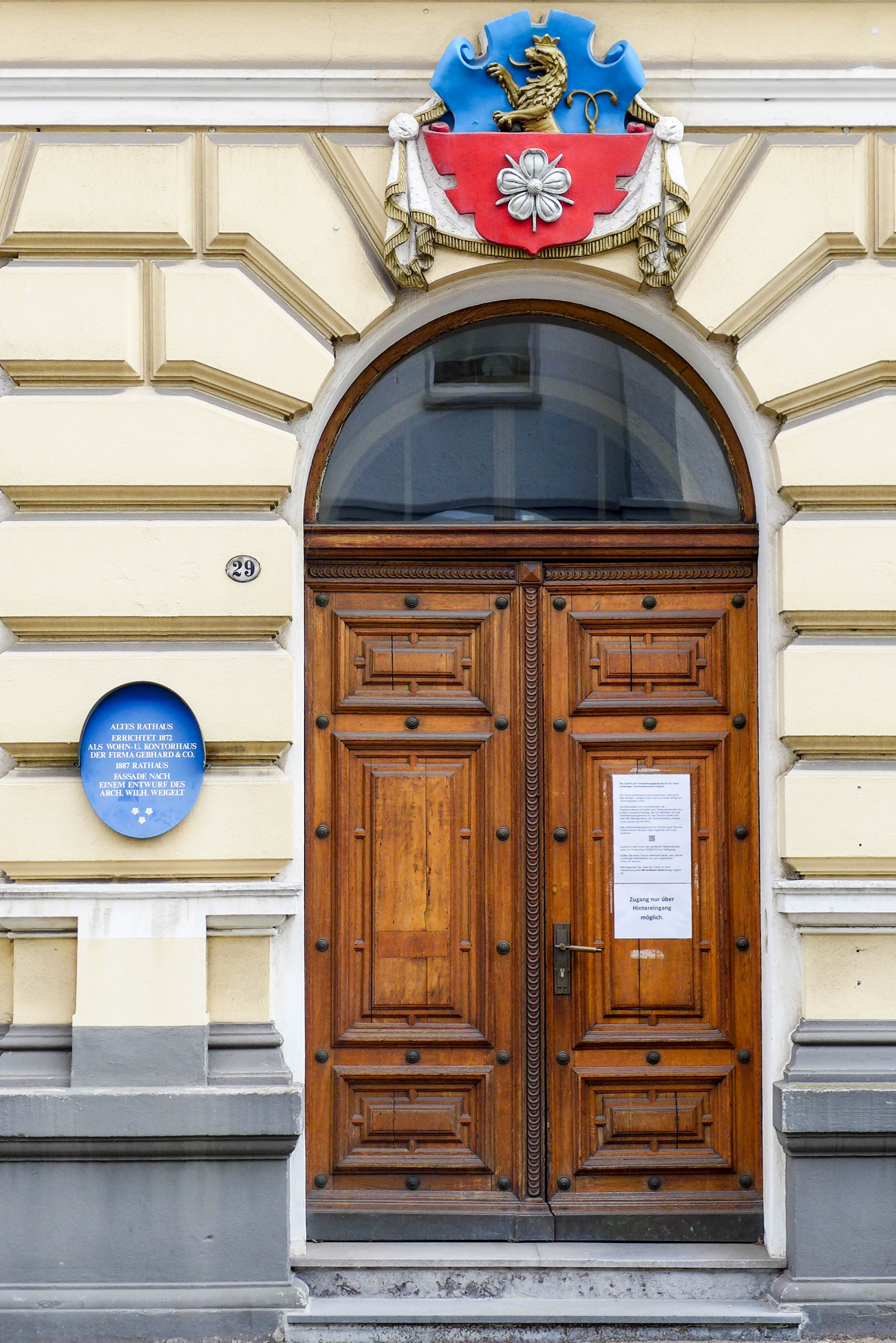 Altes Rathaus - Portal, Viersen Bemerkung: Wahrscheinlich Bahnhofstraße 29